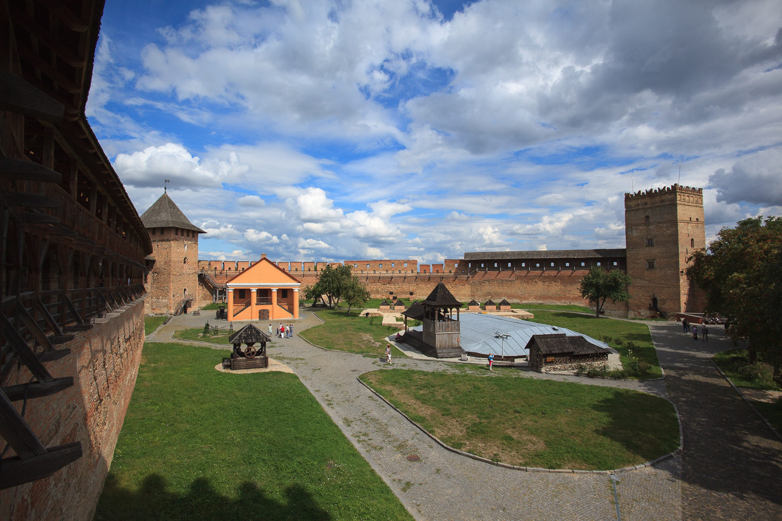 Замок